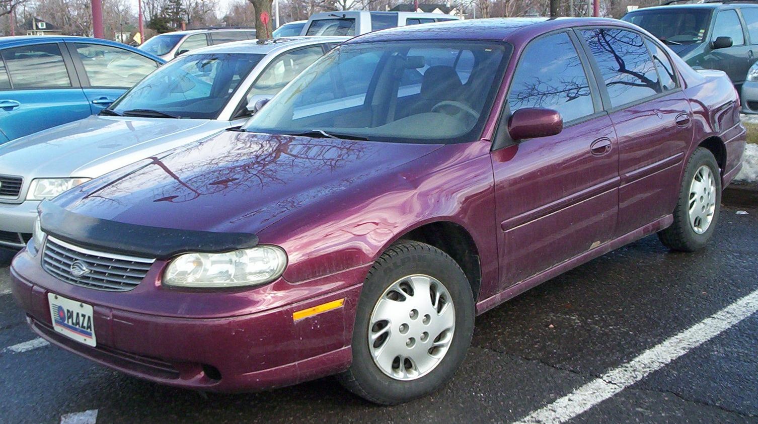 1997-1999 Chevrolet Malibu